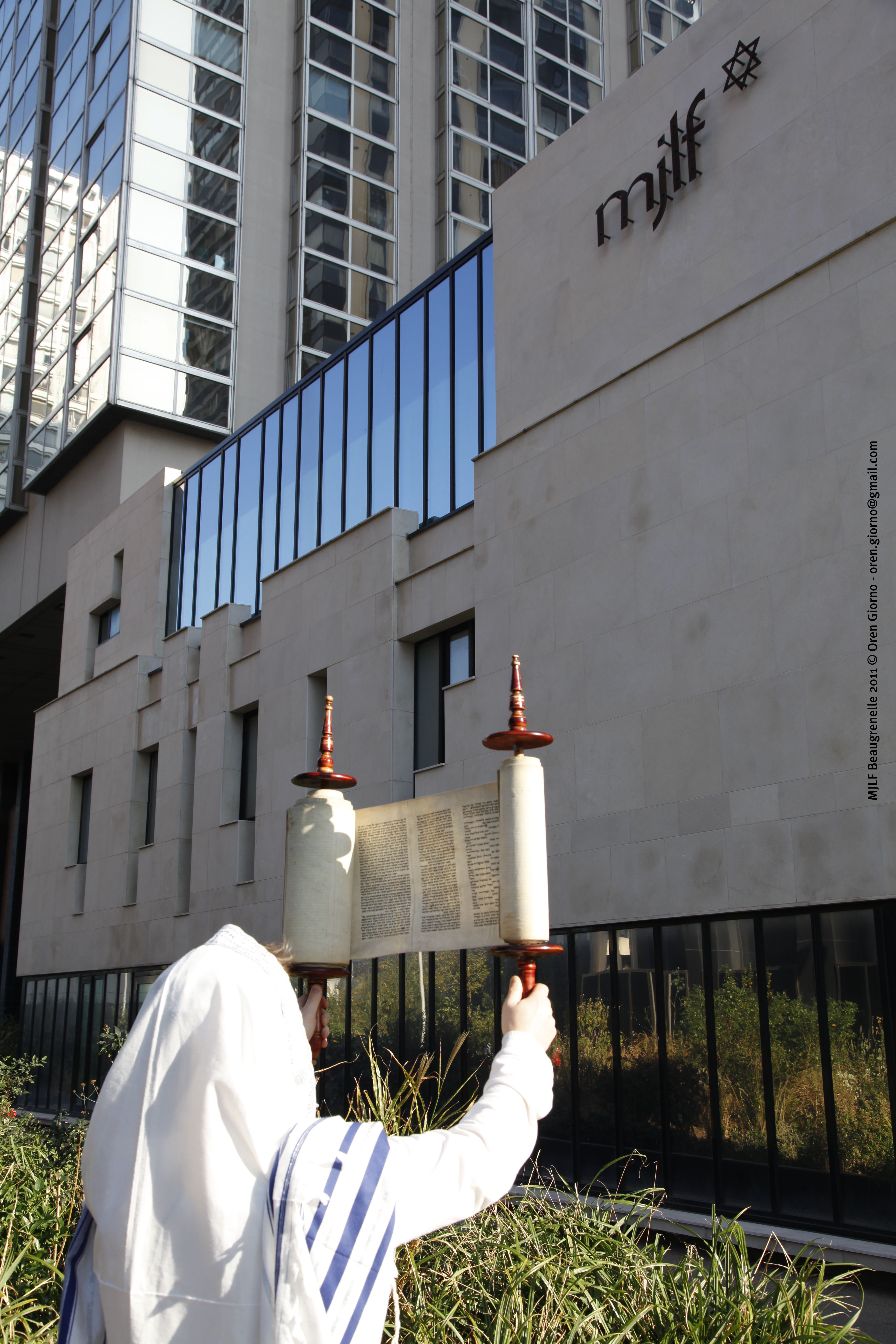 Vue du Centre communautaire du Mouvement juif libéral de France (MJLF, 11 rue Gaston-de-Caillave) depuis la dalle Beaugrenelle à Paris 15e, en novembre 2011, élévation de la Torah.